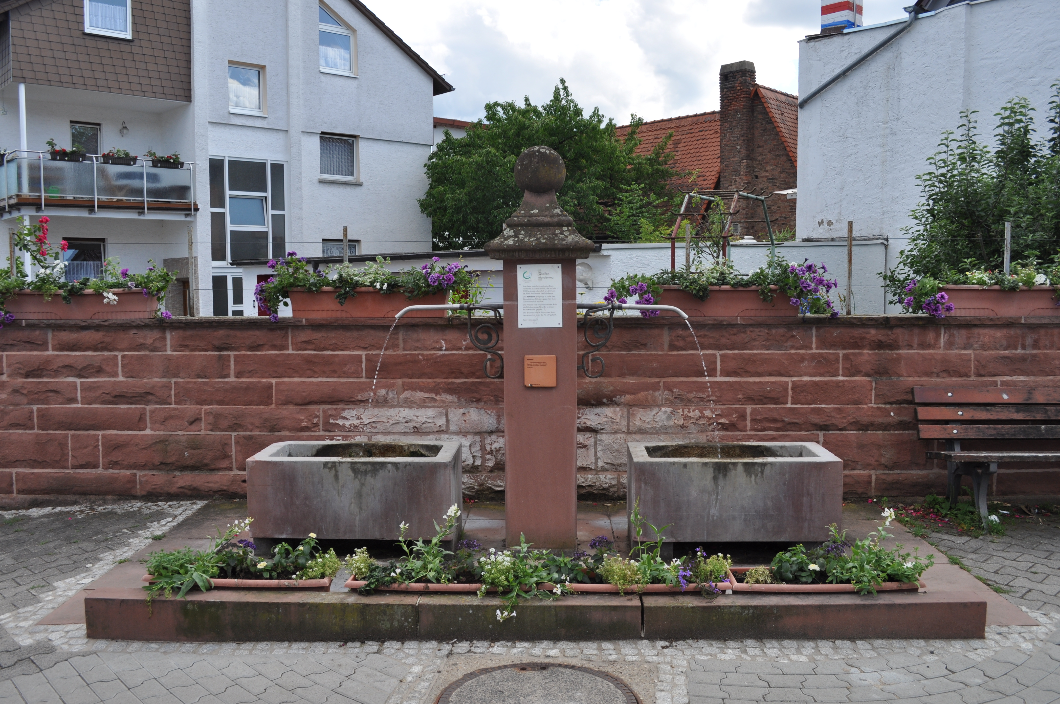 Frankfurt, Bergen-Enkheim, Röhrbornbrunnen